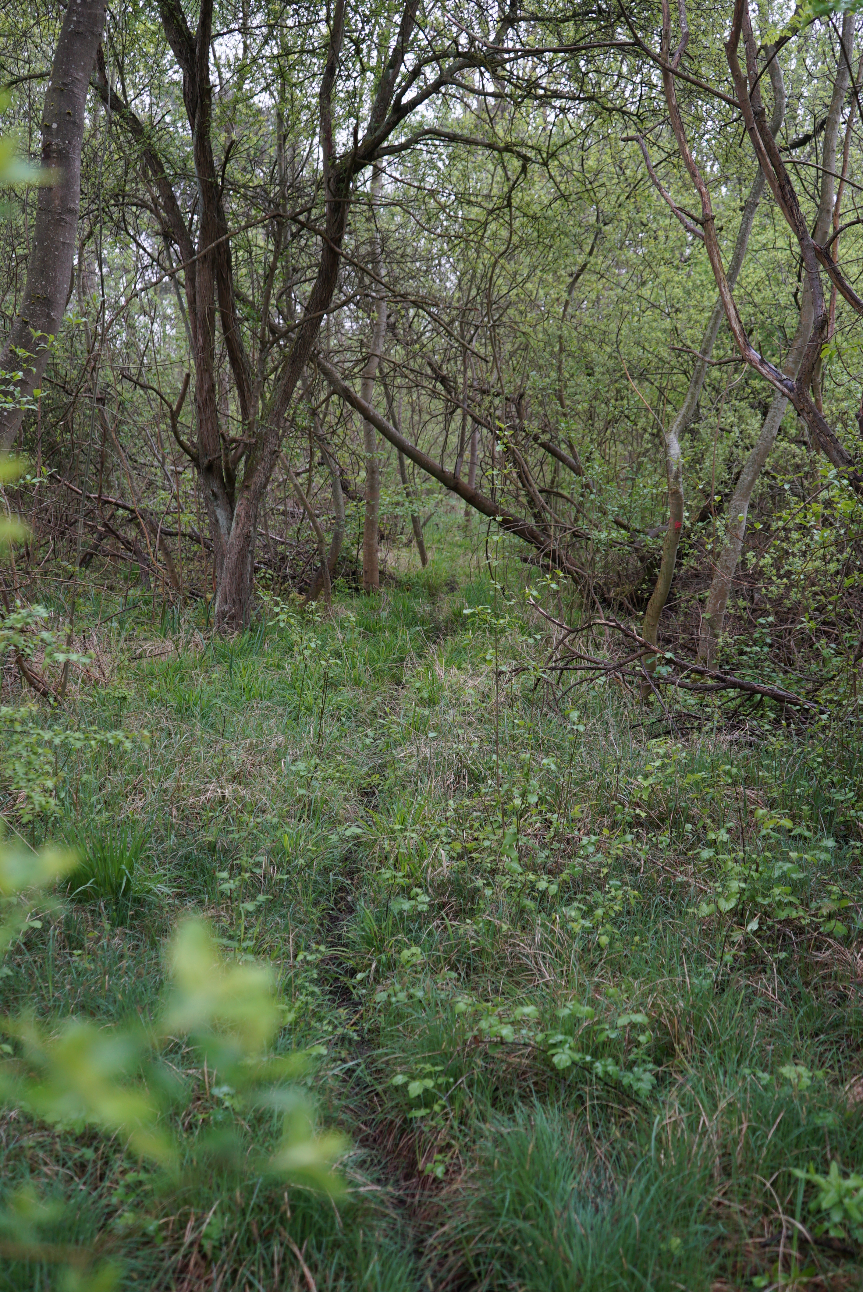 une sente dans le Réserve naturelle régionale du marais les trous de Leu.